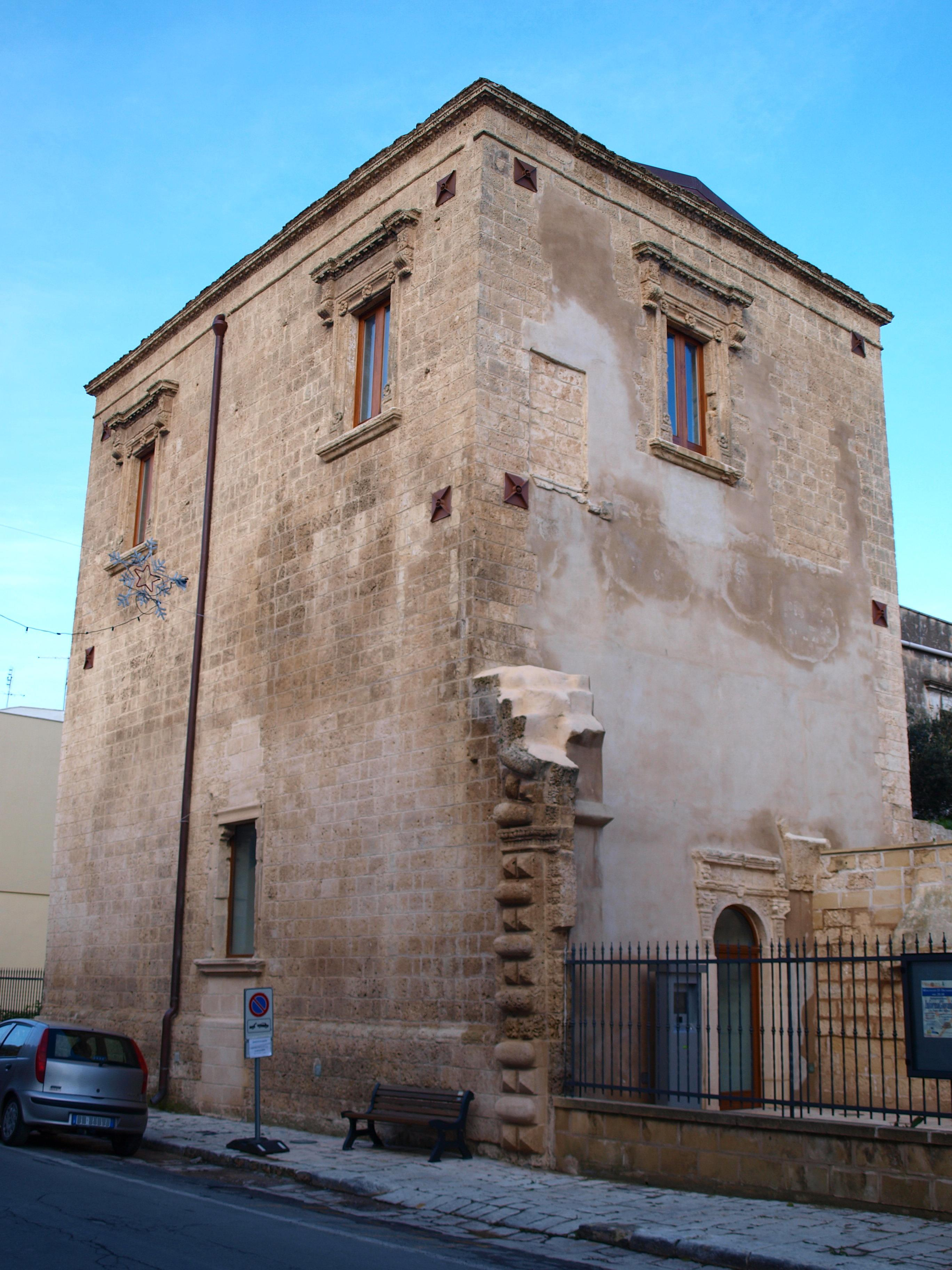 Latiano (BR), Italy: torre del Solise